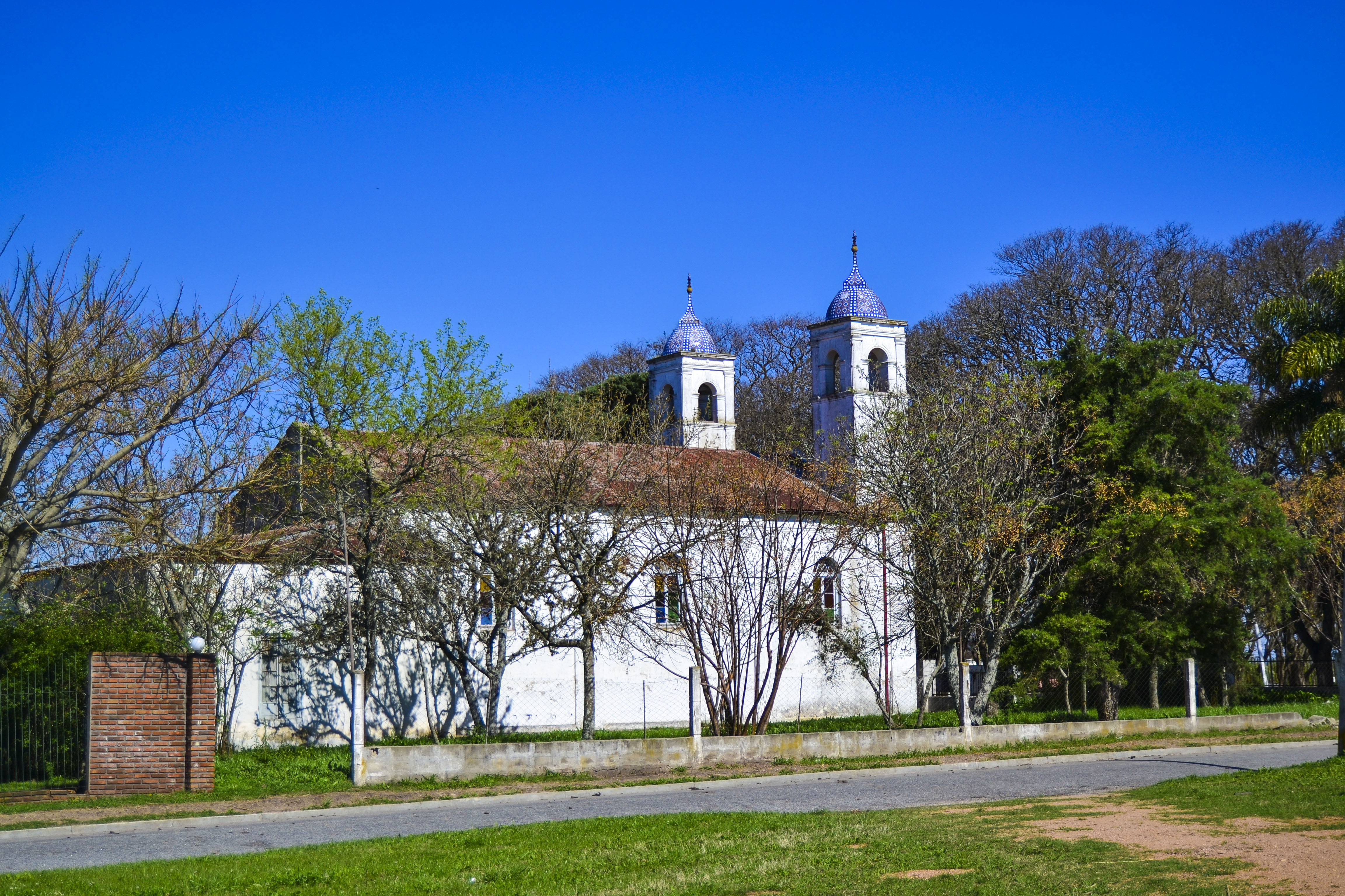 Iglesia Evangélica Valdense de la Colonia Piamontesa. Ubicada en el departamento de Colonia